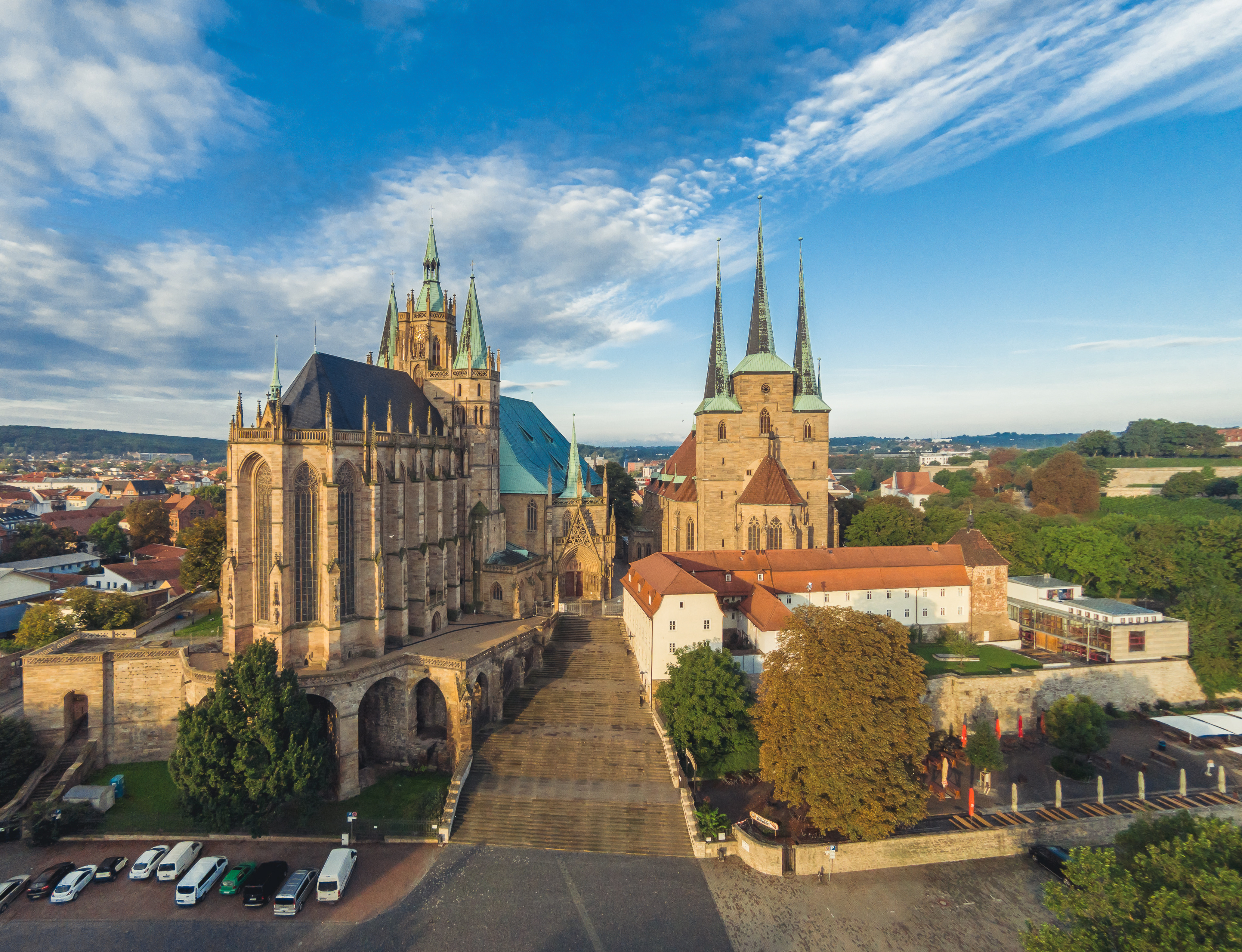 WLM-Fototour Erfurt 2014 Dieses Foto wurde im Rahmen der WLM-Fototour 2014 in Erfurt erstellt, die vom 29. bis 31. August 2014 zum Auftakt des Wettbewerbs Wiki Loves Monuments 2014 statt fand. The making of this document was supported by the Community-Budget of Wikimedia Germany. Erfurter Dom